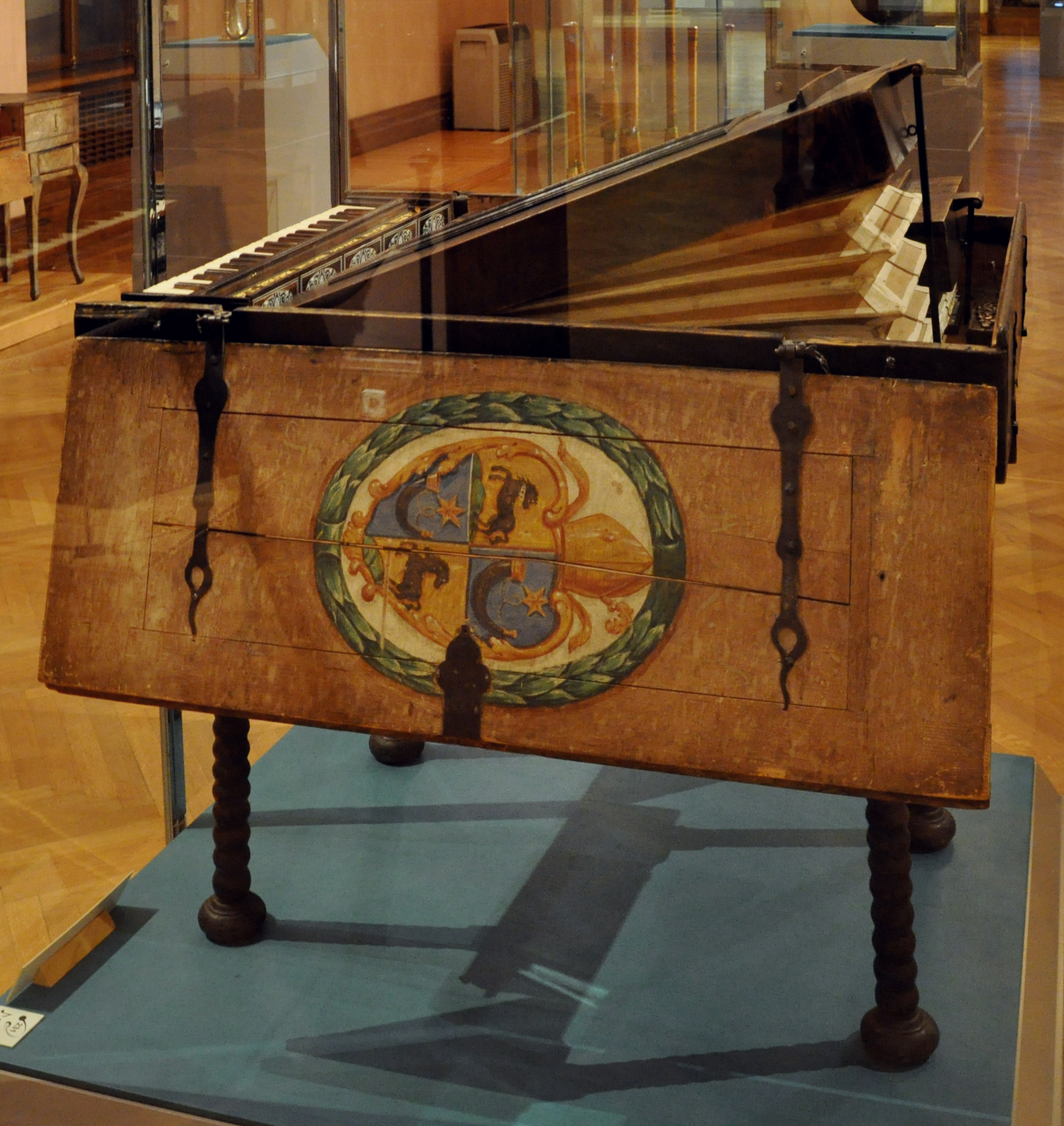 Regal aus Stift Lambach, um 1580, Traggestell datiert 1690 Wien, Kunsthistorisches Museum, Sammlung alter Musikinstrumente (Neue Burg), Inv. Nr. SAM 636